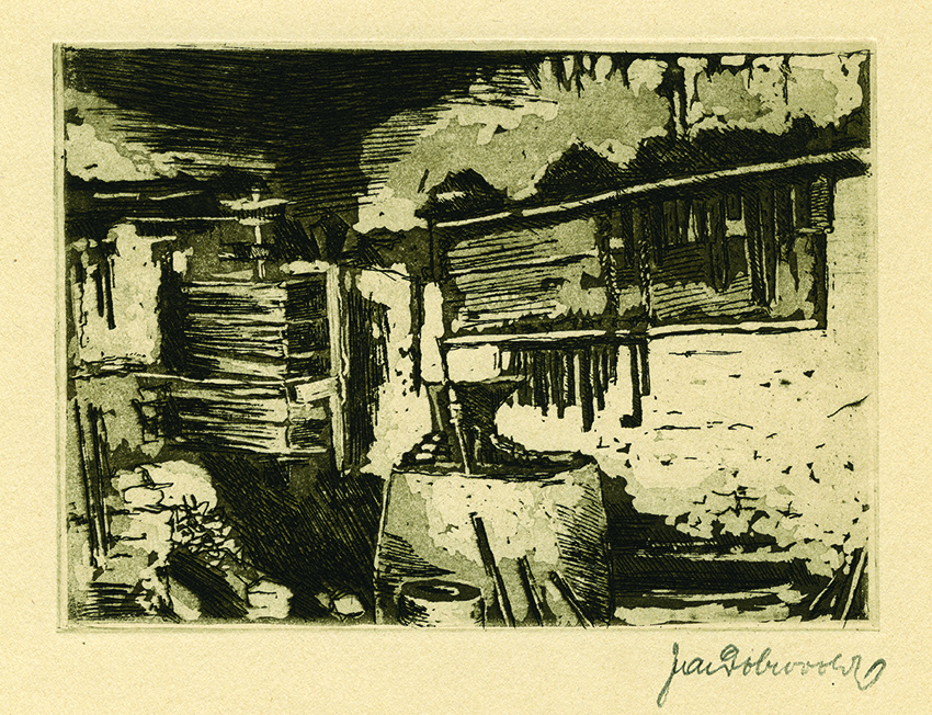 Jaroslav Dobrovolský: Kovárna presidentova v Čejči – z cyklu Presidentova dědina, 1929, lept